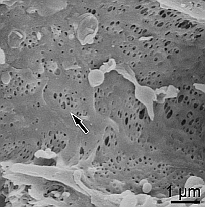 Figura 3. Ultraestructura de sinusoides deficientes en Plvap. B) SEM de un animal de tipo salvaje de 3 semanas de edad muestra la disposición de fenestraciones (flechas) en placas de tamiz que forman aberturas individuales. Vista desde el interior del sinusoide.